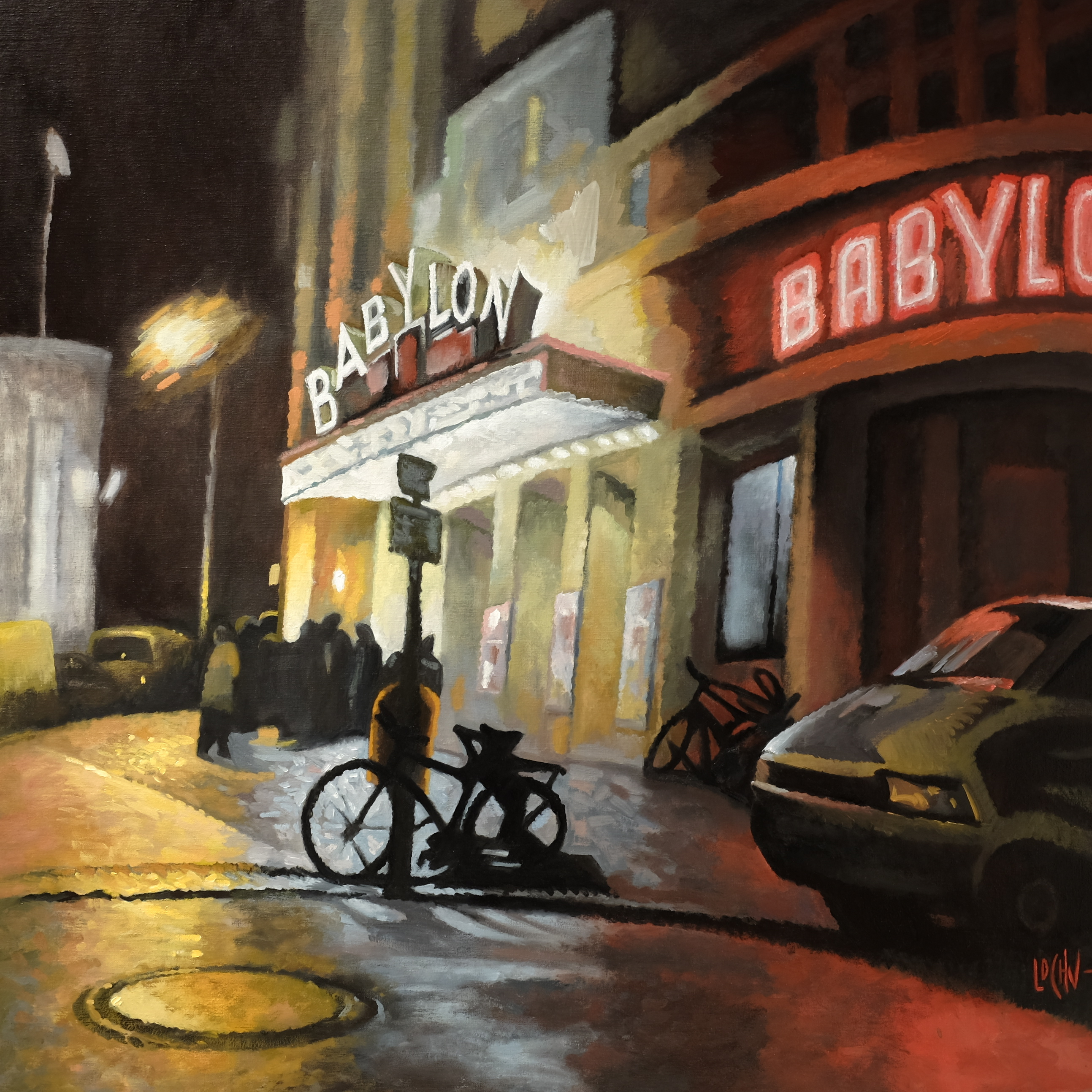 Kino Babylon, 100x100 cm Huile sur toile, Claude-Max Lochu